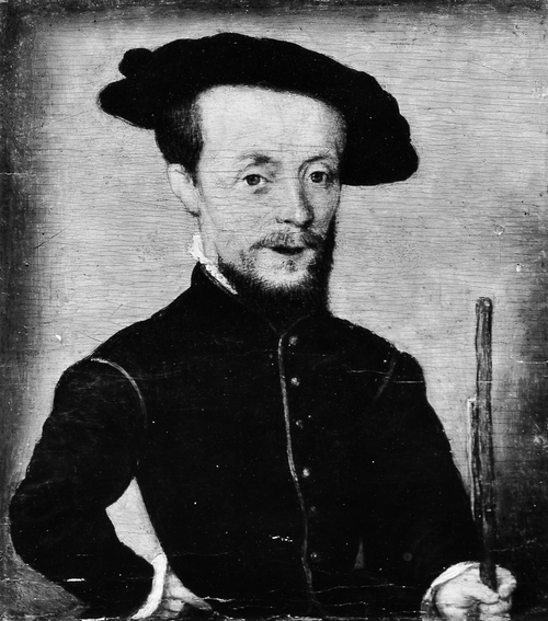 Portrait of a Dwarf Dubois de Groër (1996) has called the sitter maître Martin, identifying him with the court jester for whom a costume was commissioned in Lyon in 1536: "A ung fol nommé Maistre Martin, dict Le Bailly [the bailiff?], de la maison de Messeigneurs les daulphin, ducz d'Orléans et d'Angoulesme, pour luy fair habillement pour son service a ce qu'il soit plus honnestement habillé pres et autour des personnes de nosdicts seigneurs, le tout suivant lettres patentes du roy nostre seigneur données a Lyon le 18e jour de juillet 1536." [see comptes de l'Argenterie du roi, Archives Nationales, KK 91, folio 239 verso, cited by A. Jal, Dictionnaire critique de biographie et d'histoire, Paris, 1867, p. 601]